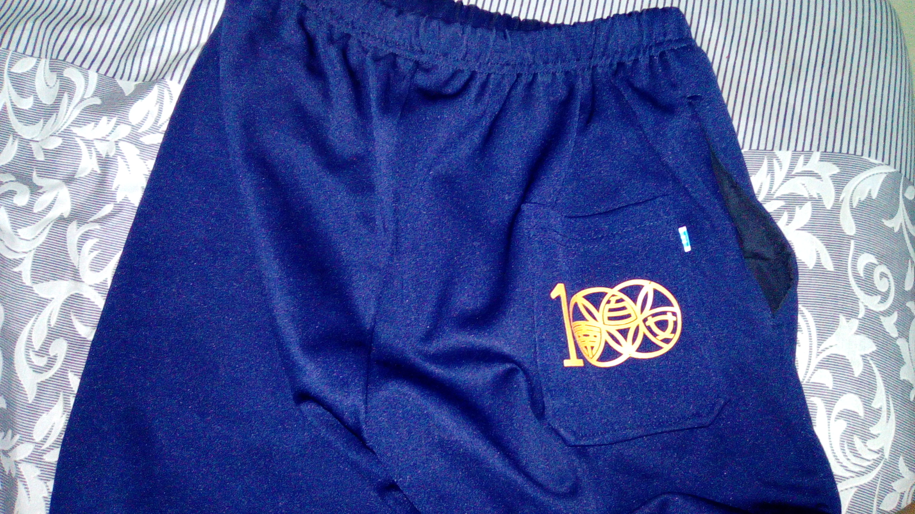 同上 短褲後橙色的LOGO象徵「百年南女」及當地農村風情的紀念意涵